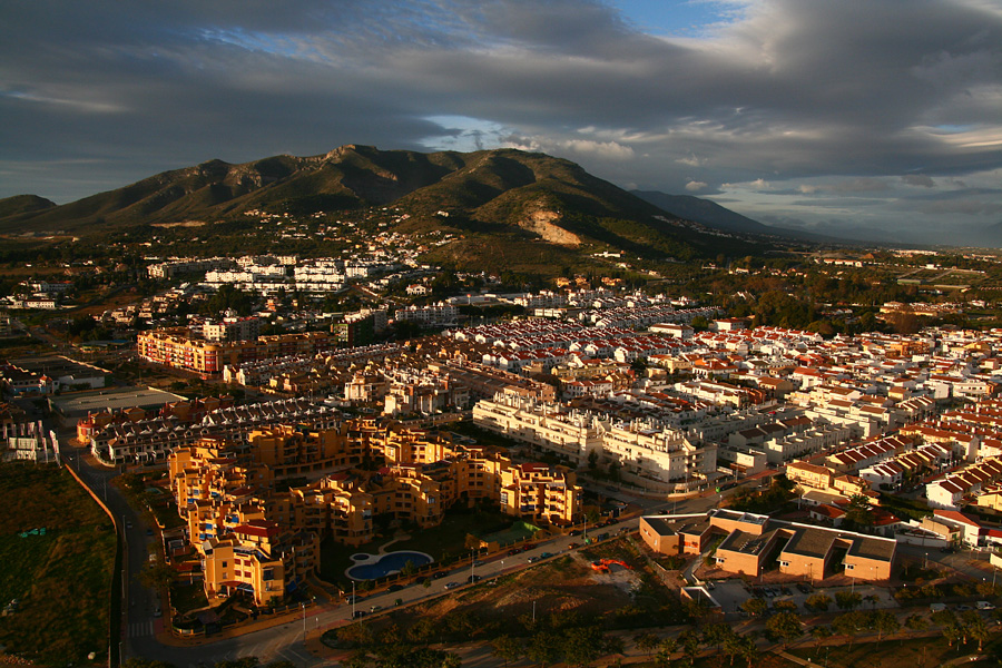 Málaga al amanecer. Vista aérea de Churriana